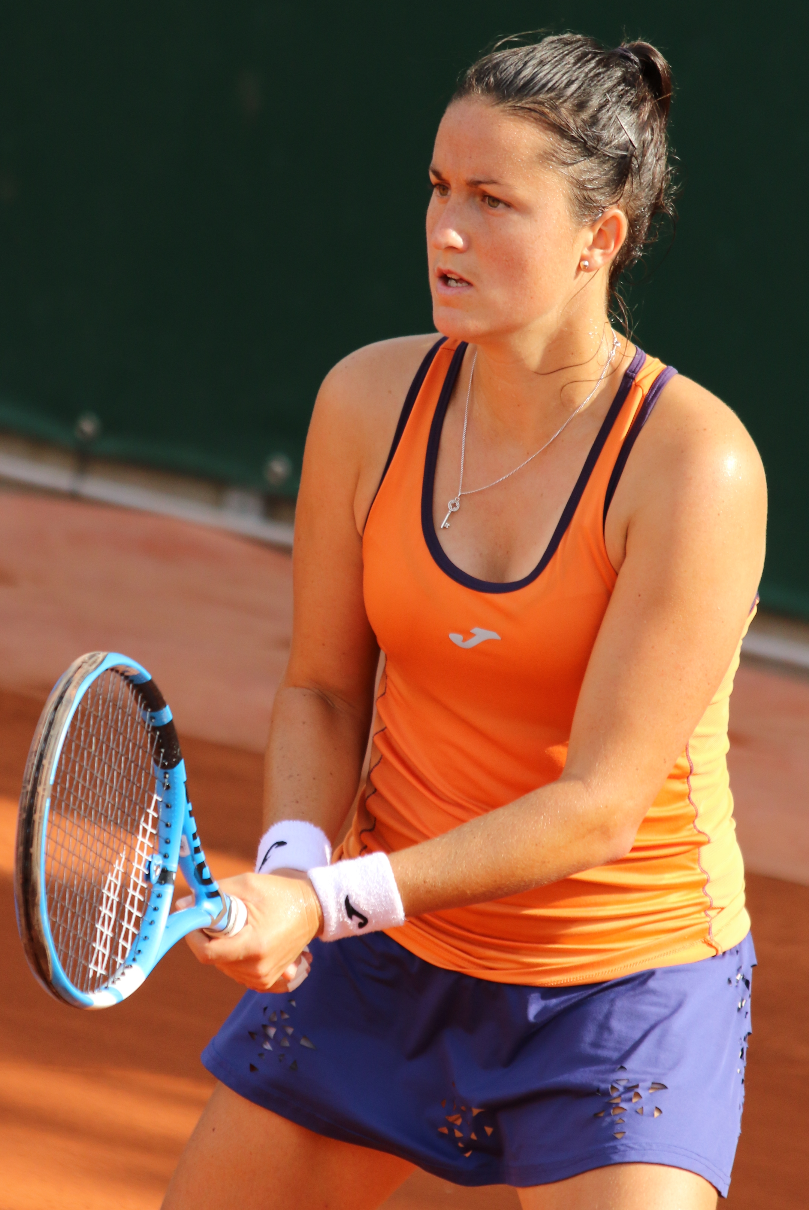 Arruabarrena RG18 (10)